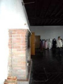 Вид изнутри